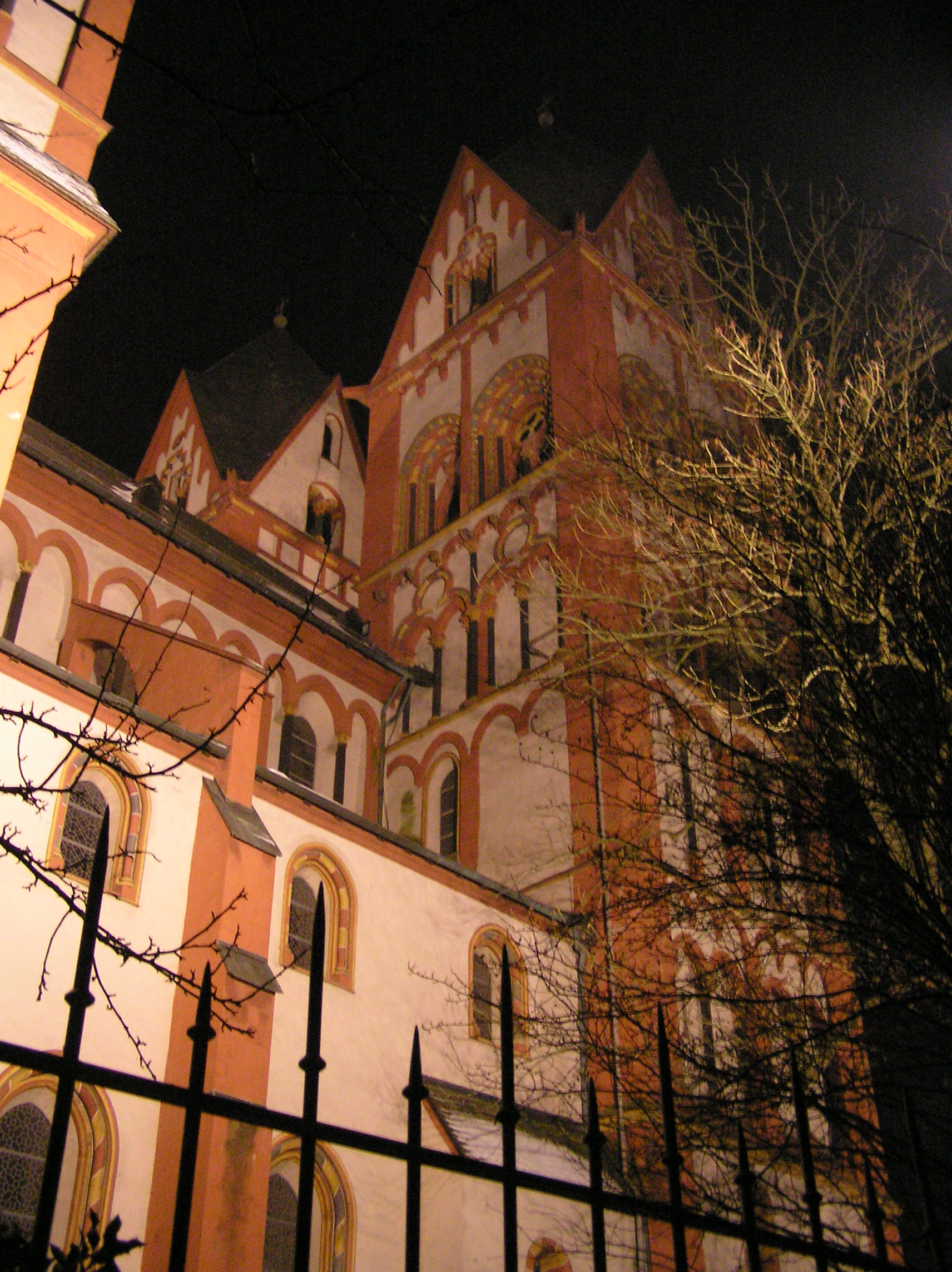 Der Limburger Dom am Abend